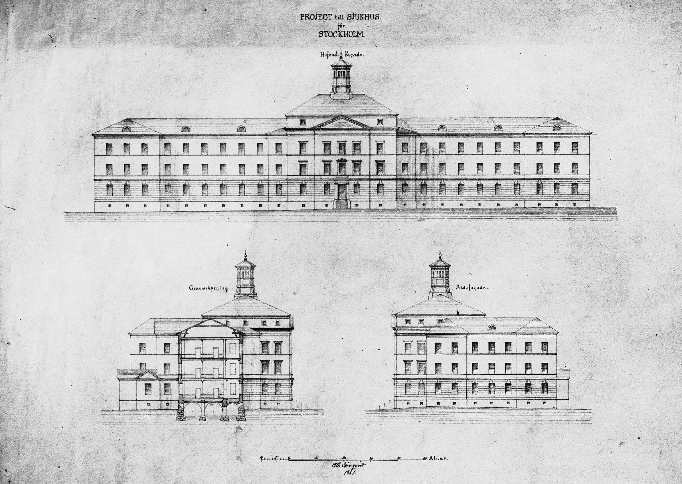 Förslag till nytt Katarina Sjukhus